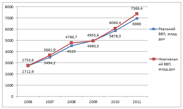 ВВП номинальное и реальное КИТАЯ за 2006-2011 г.